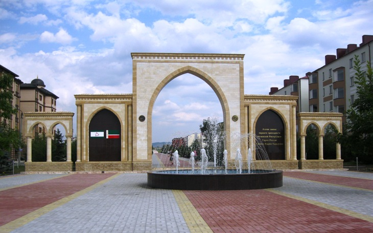 Аллея А. Кадырова в Магасе